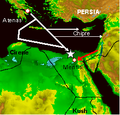 Egipto, Rebelion de Inaro